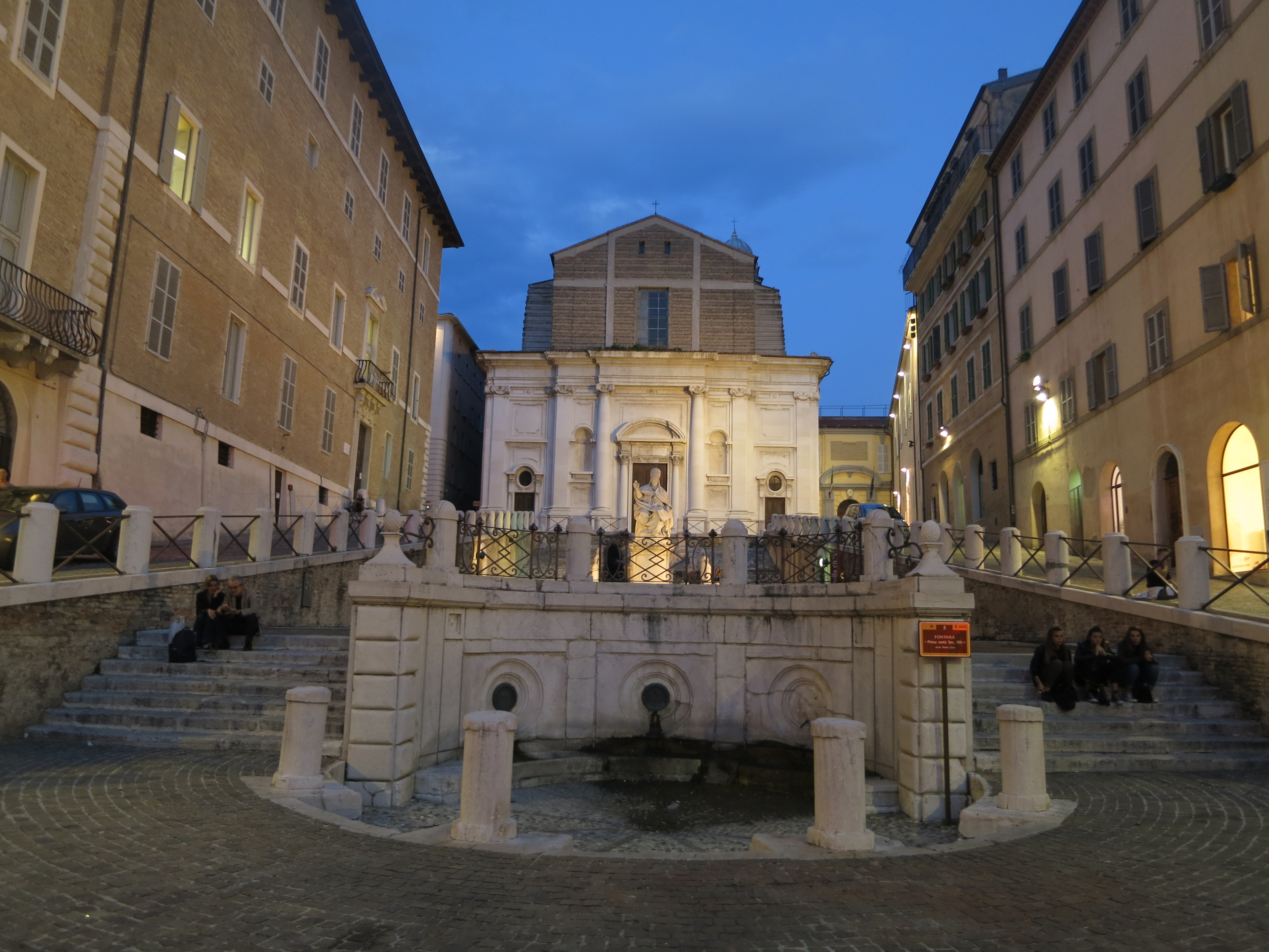 Scalinata Piazza del Plebiscito This is a photo of a monument which is part of cultural heritage of Italy.